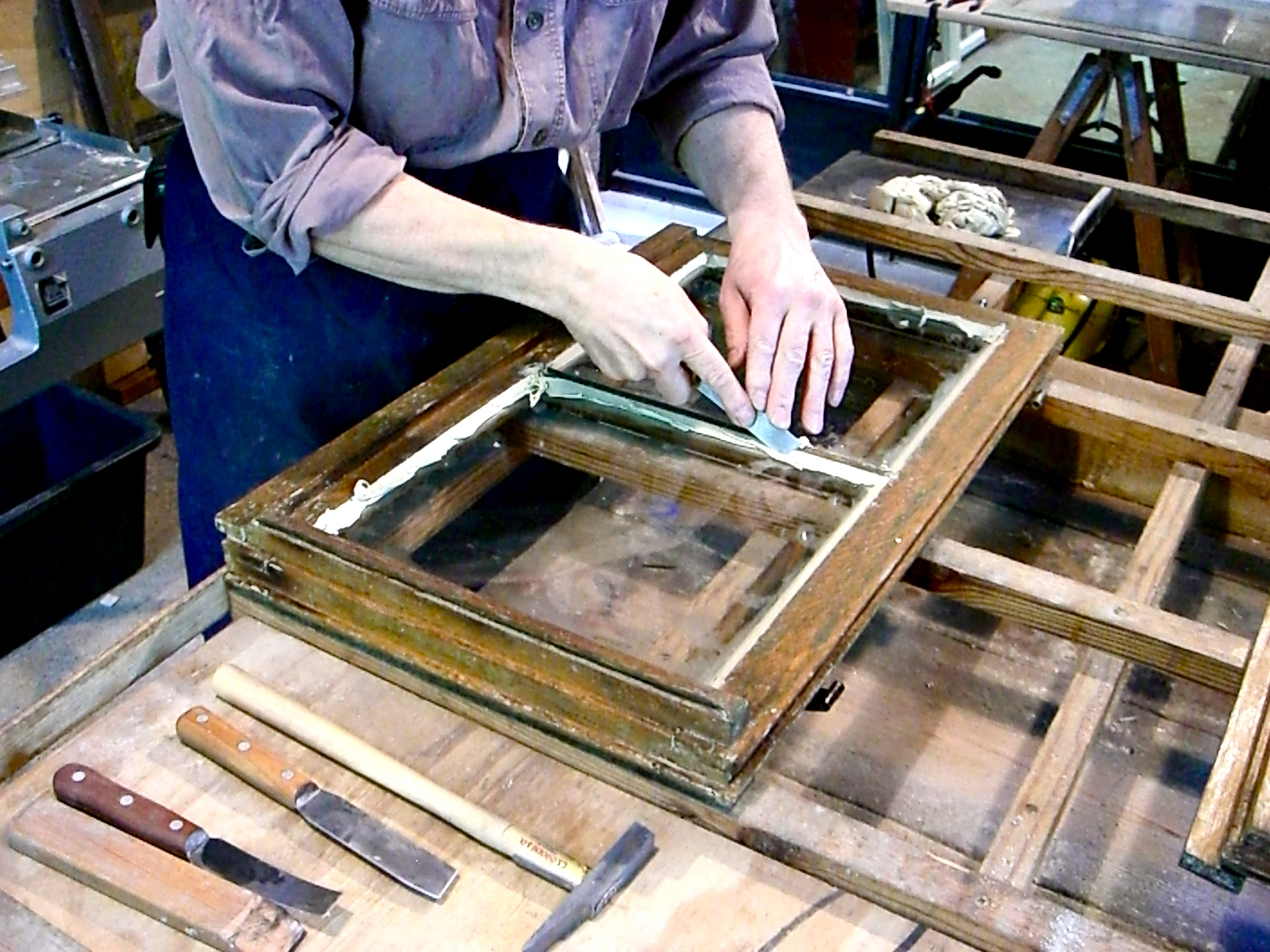 Mit Leinölkitt werden historische Scheiben neu eingekittet.